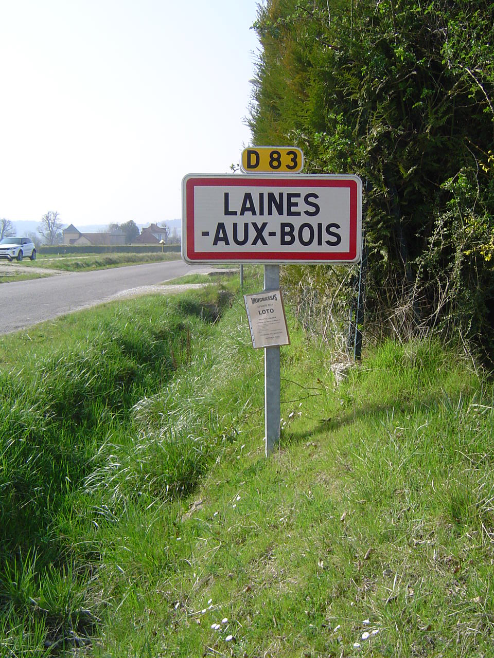 Laines-aux-Bois - Panneau d'entrée du village